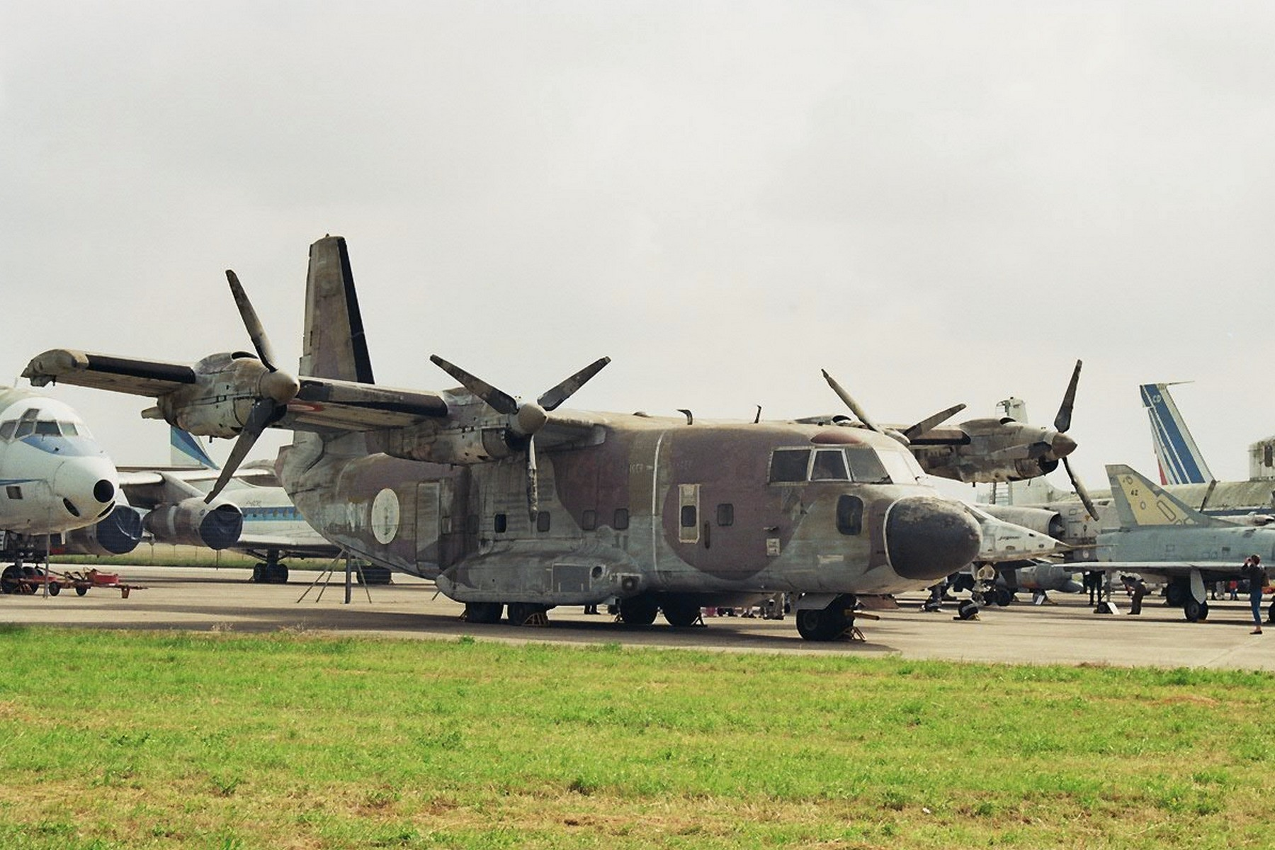 Avion de transport militaire Breguet 941 vu ici sur le tarmac des réserves du Musée de l'Air et de l'Espace.